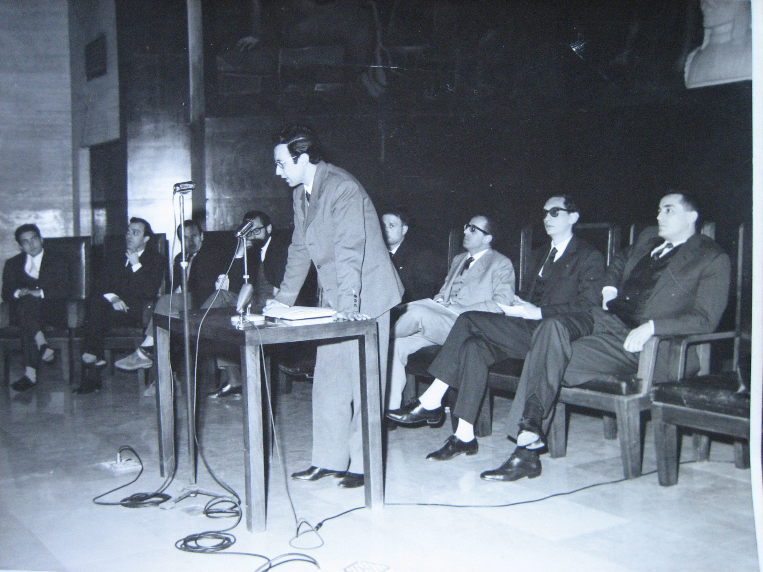 Aula magna dell'uni sapienza. De Liguori e Vittorio Gassmann